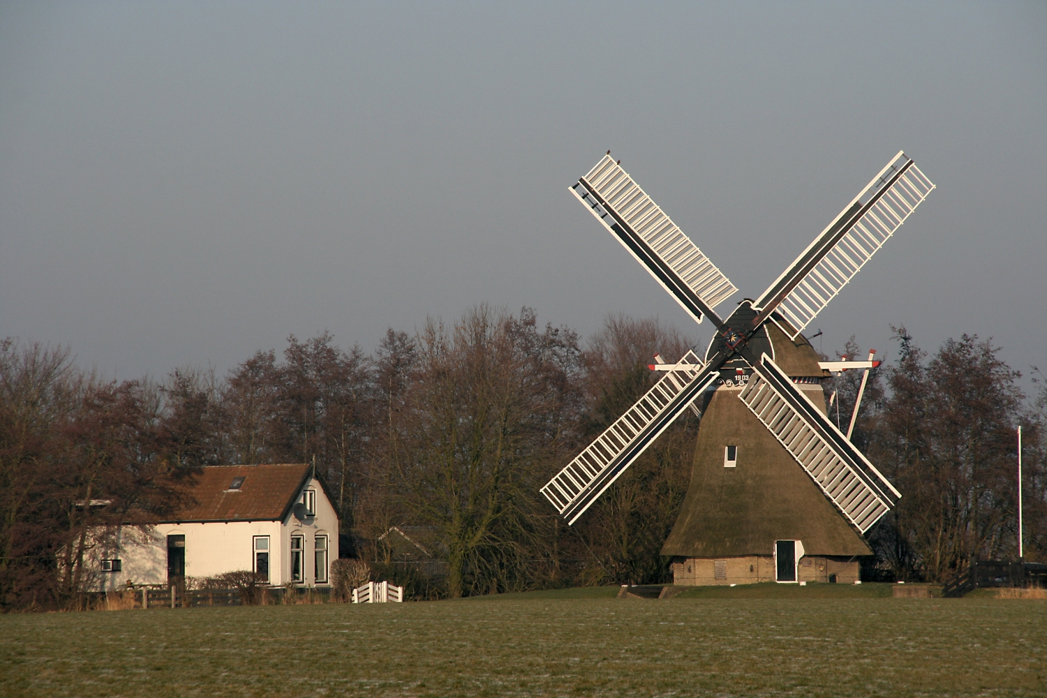 Marssum:Marssumermolen